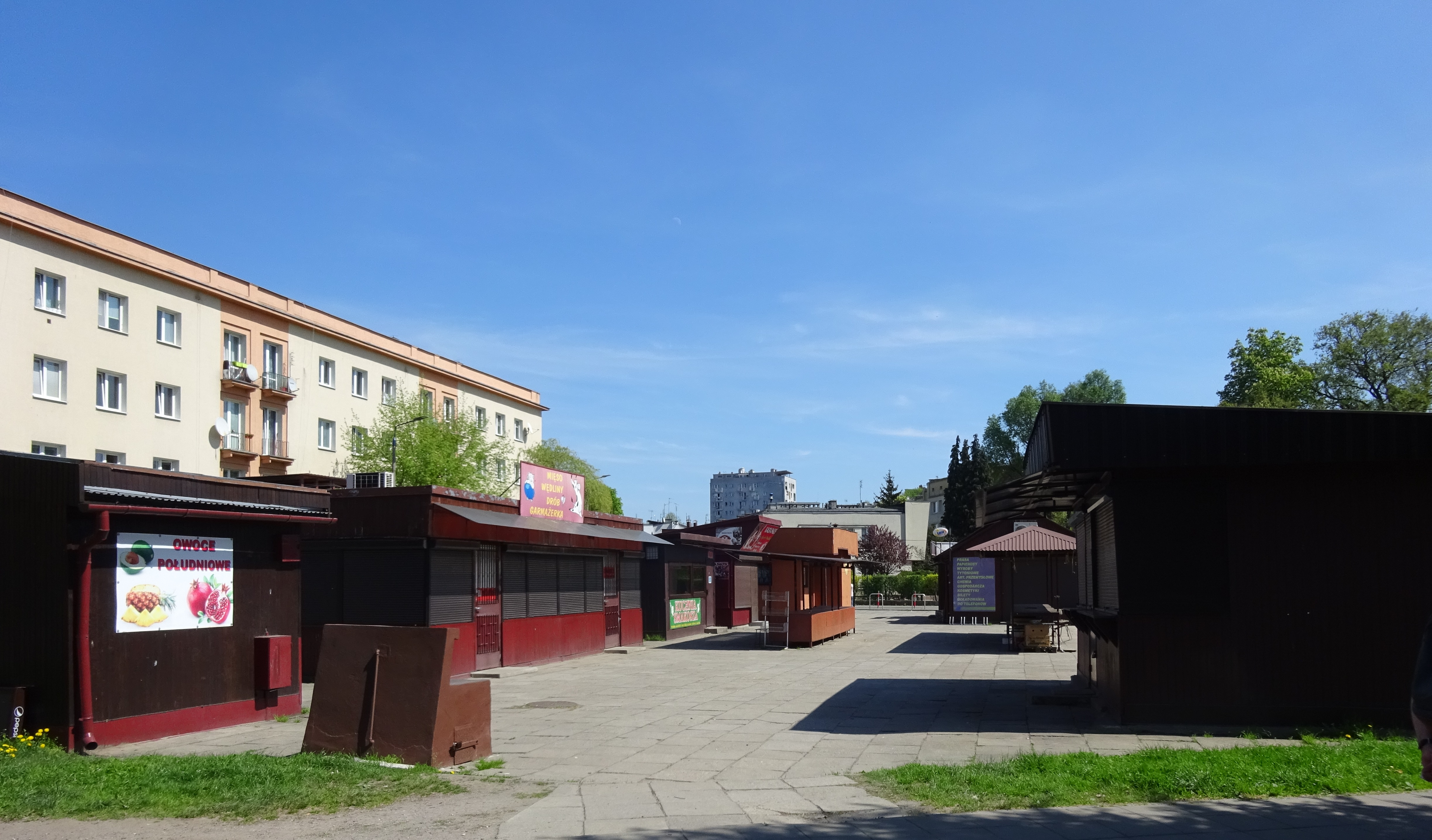 Plac Targowy (zieleniak) w Łobzowie przy ul. Rydla. Widok od strony zachodniej. Kraków.